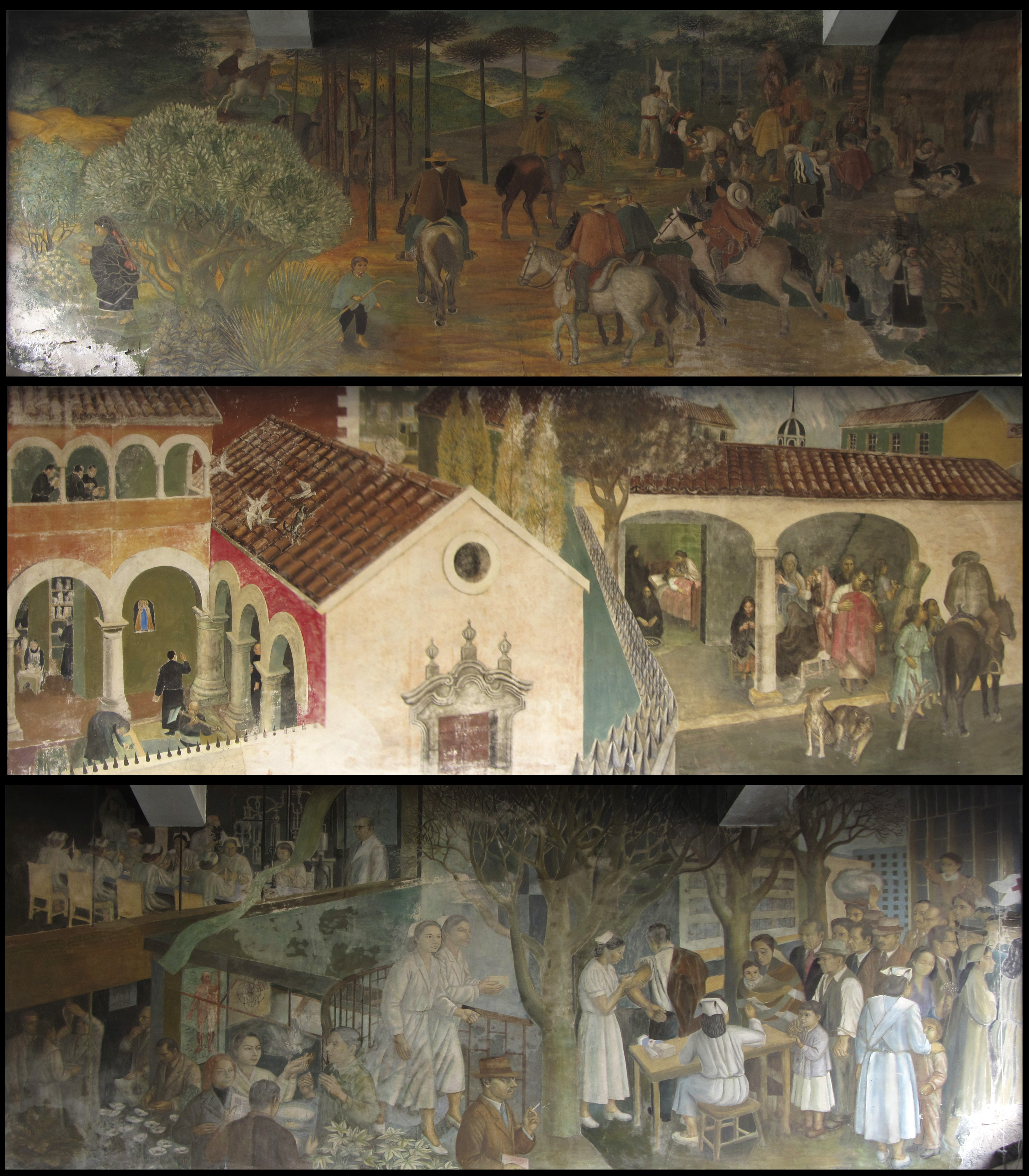 Mural "Historia de la medicina y la farmacia en Chile", de Julio Escámez (1957). Antigua Farmacia Maluje, actual Droguería Alemana, Concepción, Chile. Septiembre de 2012.